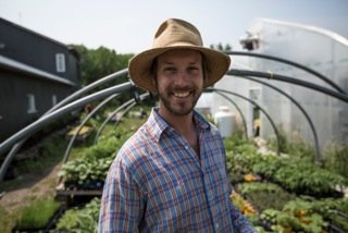 Jean-Martin Fortier, à la Ferme de la Moulinette